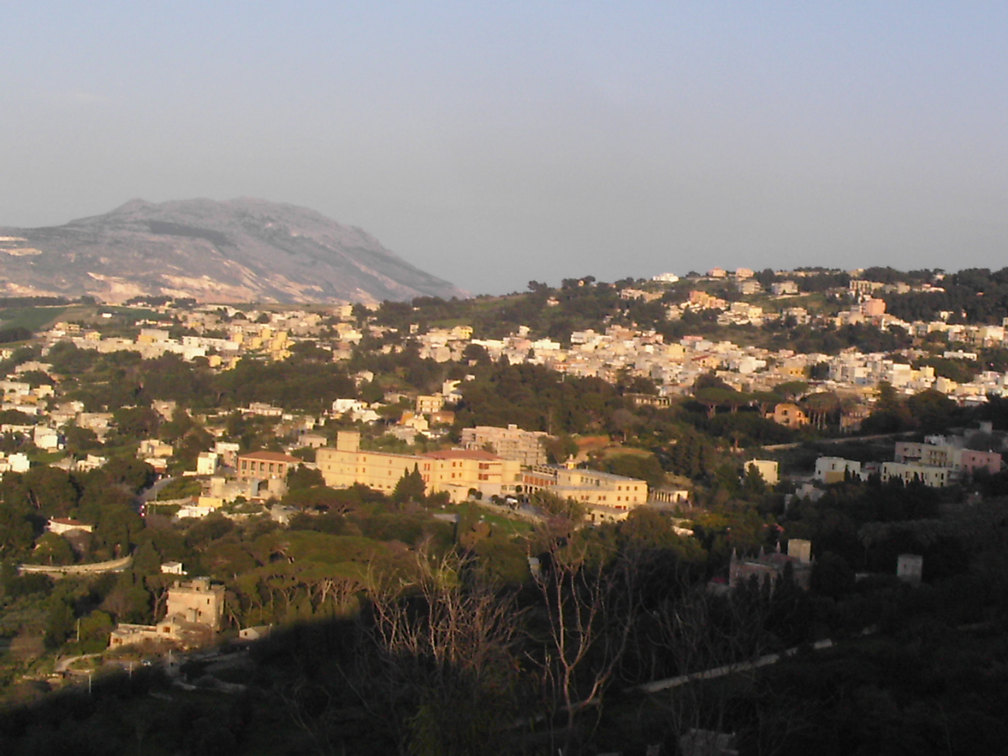 Questo file mostra un panorama della città di Valderice (TP).